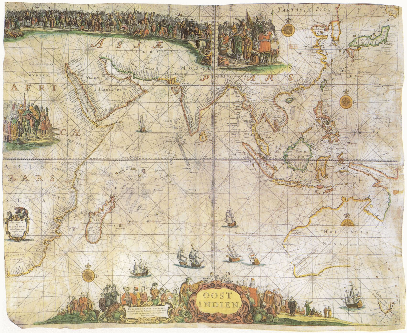 title=Oost Indien;size=715x890mm; op Perkament